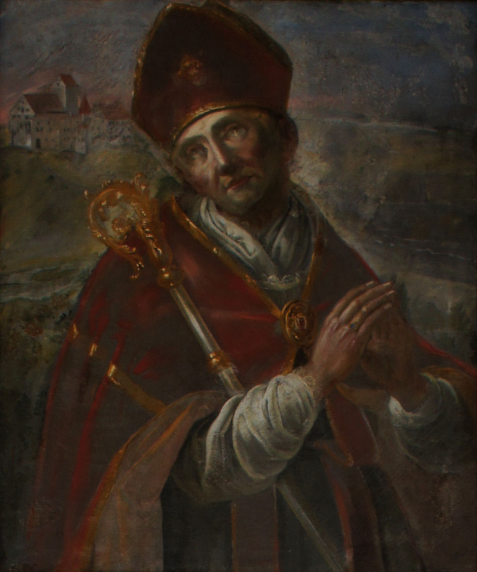 Porträtgemälde von Atto, Bischof von Freising, im Fürstengang zwischen Fürstbischöflicher Residenz und Freisinger Dom.